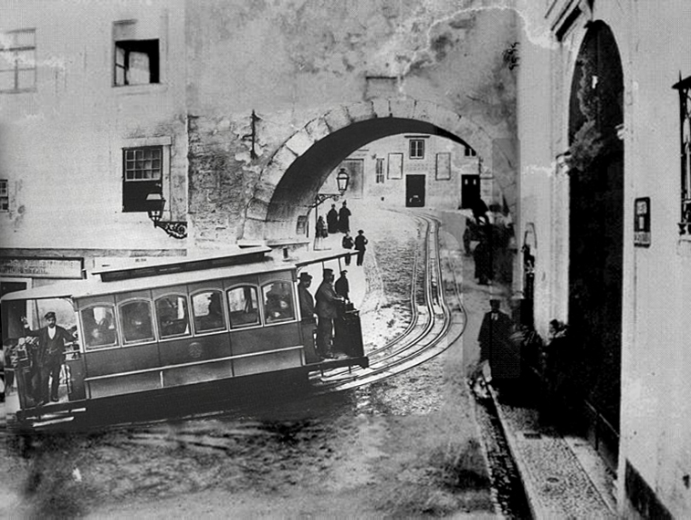 Imagem composta a partir de duas versões parciais: File:ElevadorGraca@Arco(A77588).jpg, mais área original (completo?) File:Graca cable tram.jpg, melhor detalhe e contraste Sem valor artístico, esta composição deverá ser substituída por uma digitalização de alta qualidade do original.